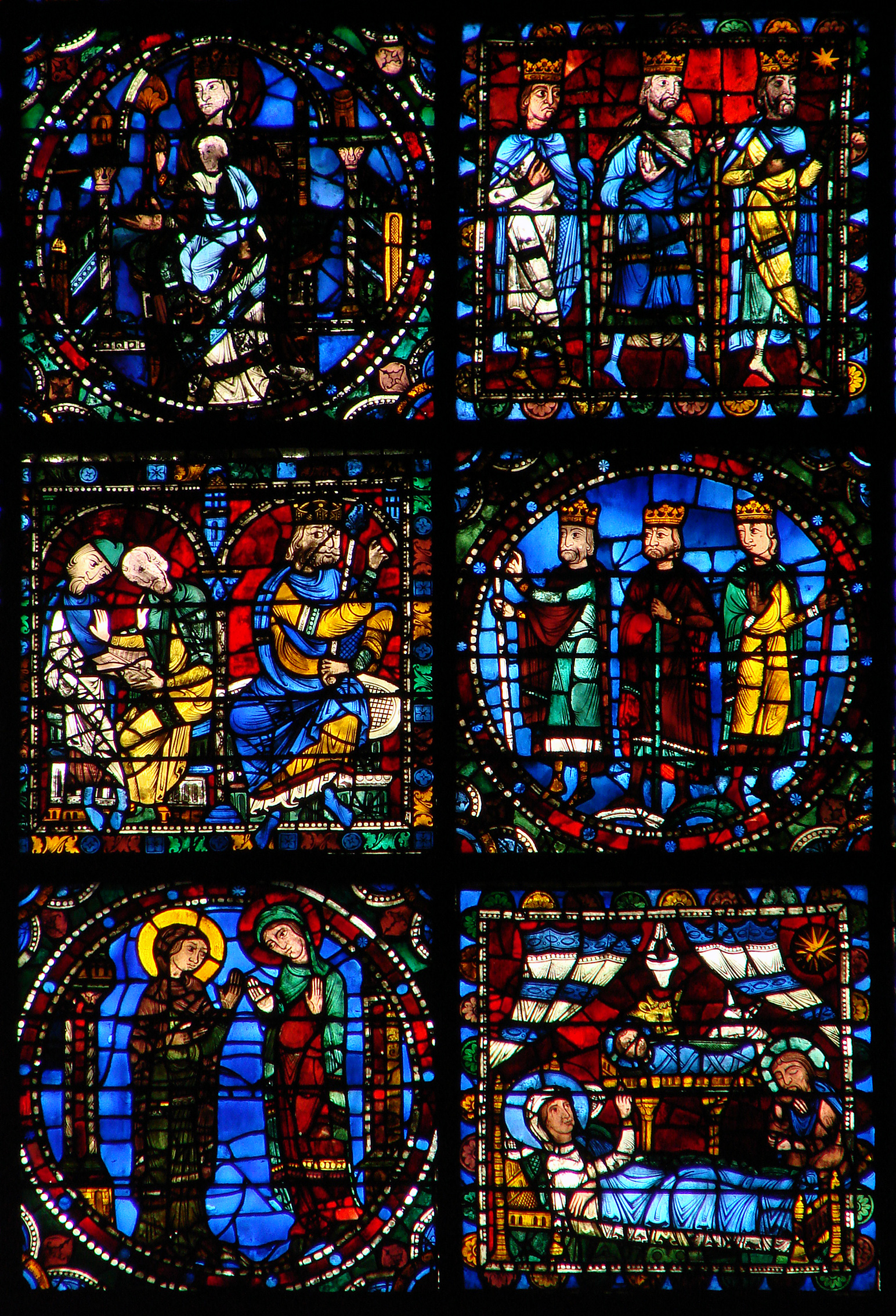 Détail d'un vitrail de la cathédrale Notre-Dame de Chartres (façade): scènes autour de la naissance du Christ ( la Visitation, les Rois Mages, Hérode).